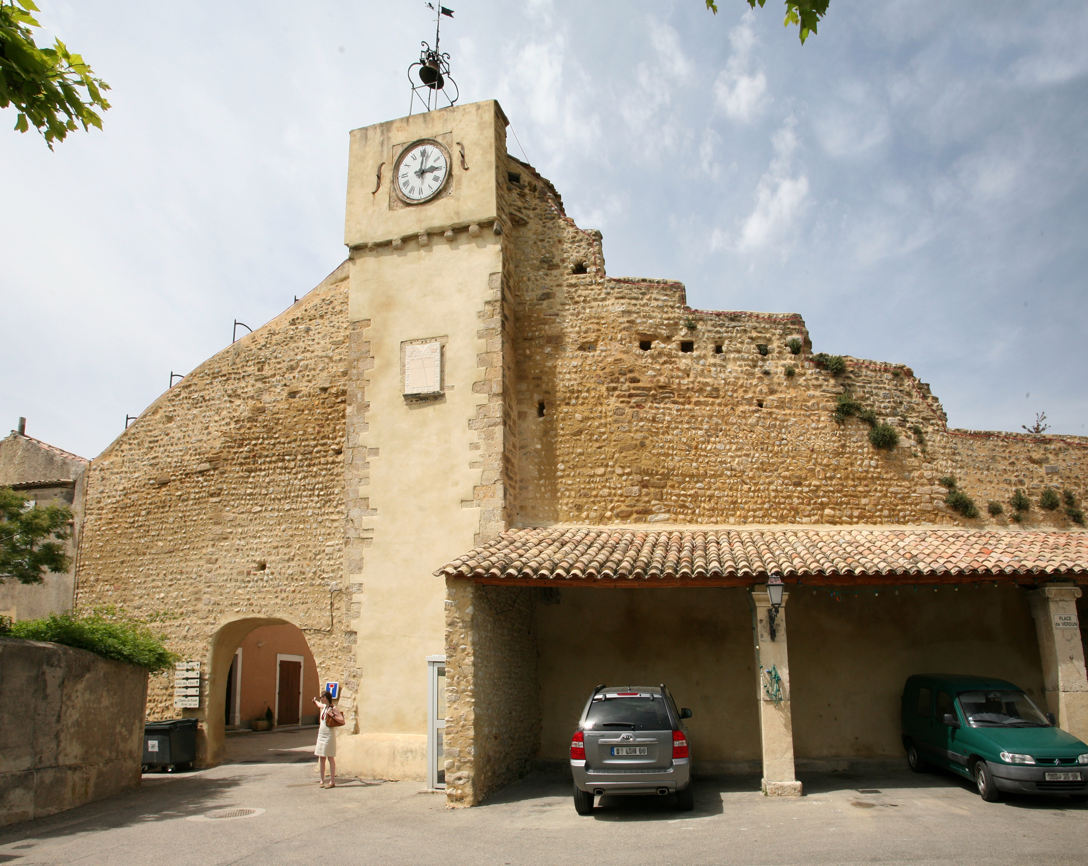 Buisson (Vaucluse)